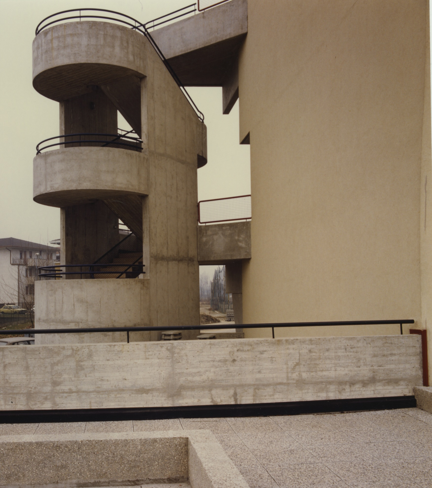 nuova urbanistica, Padova